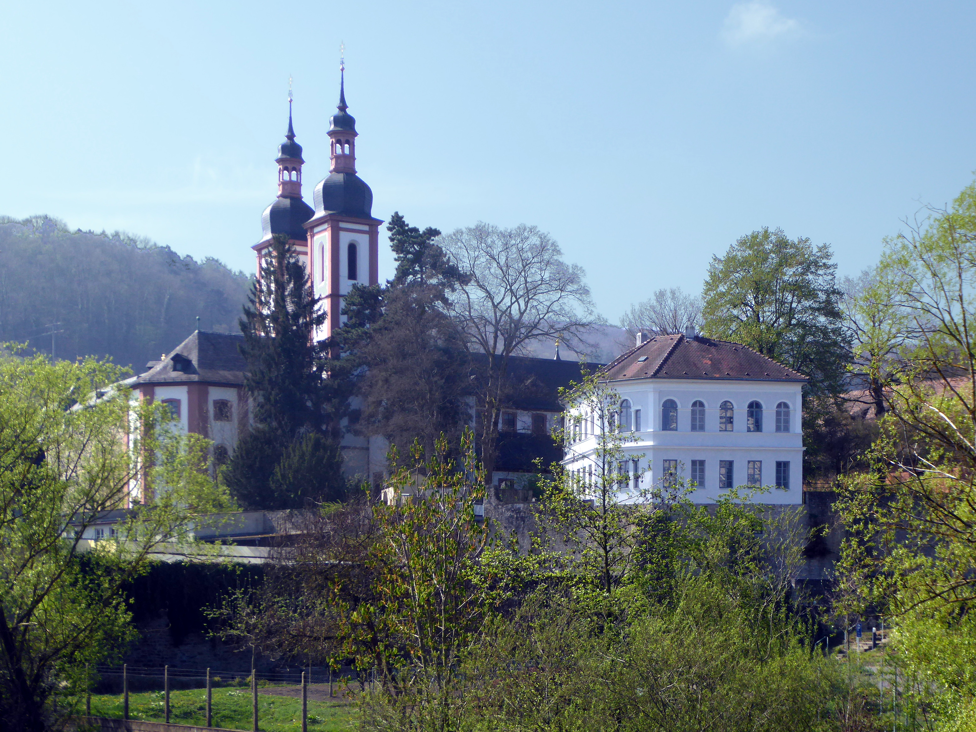 Kloster Oberzell, Michaelskirche,_vom Main aus gesehen.